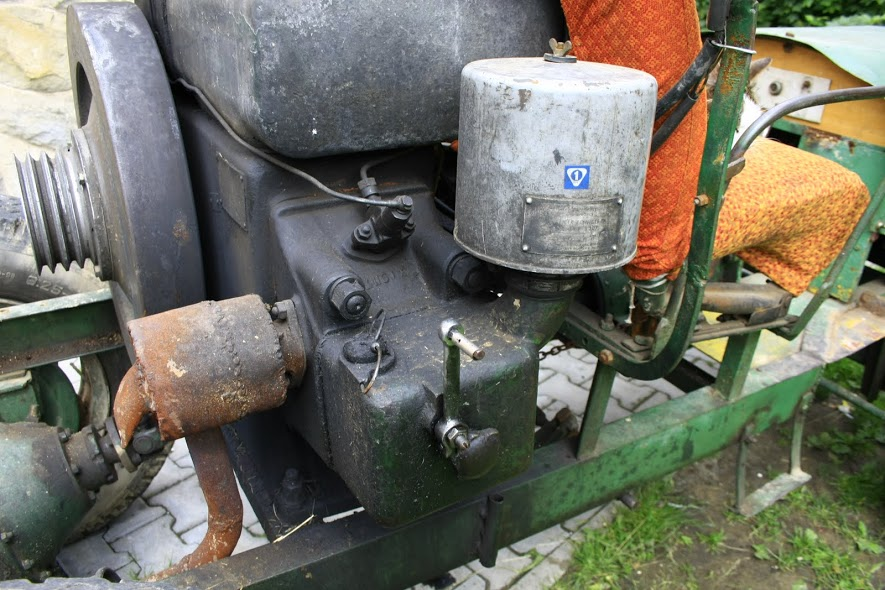 Silnik WSW Andoria S-320 widziany od strony głowicy i pokrywy zaworów. Od lewej koło zamachowe, tłumik wydechu, po prawej filtr powietrza. Dźwignia w dolnej części zdjęcia to odprężnik - tu w pozycji otwartego zaworu wydechowego. Powyżej widoczny wtryskiwacz paliwa, wraz z przewodami od pompy paliwa.